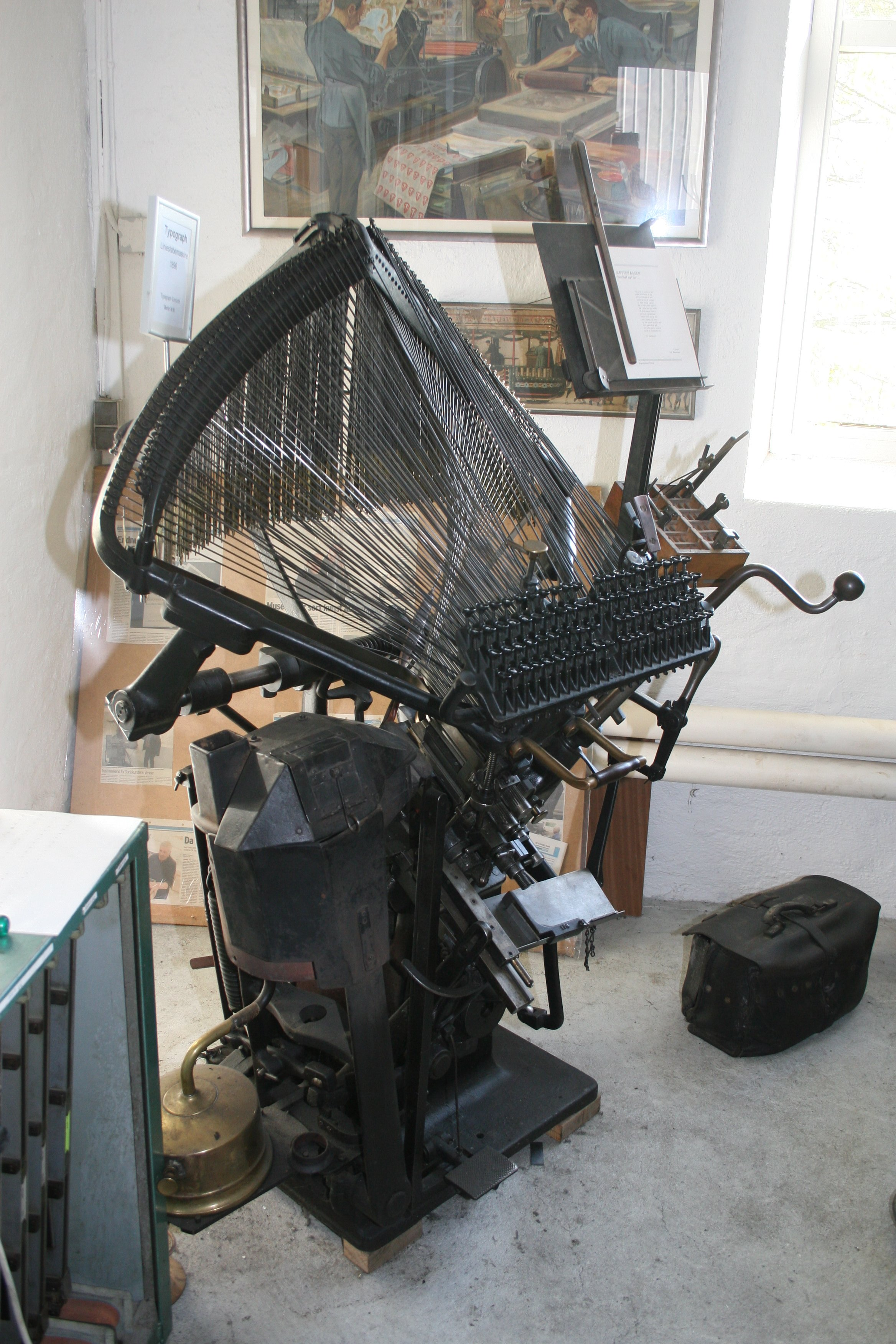 Typograph sættemaskine. Vingaards Officin i Viborg